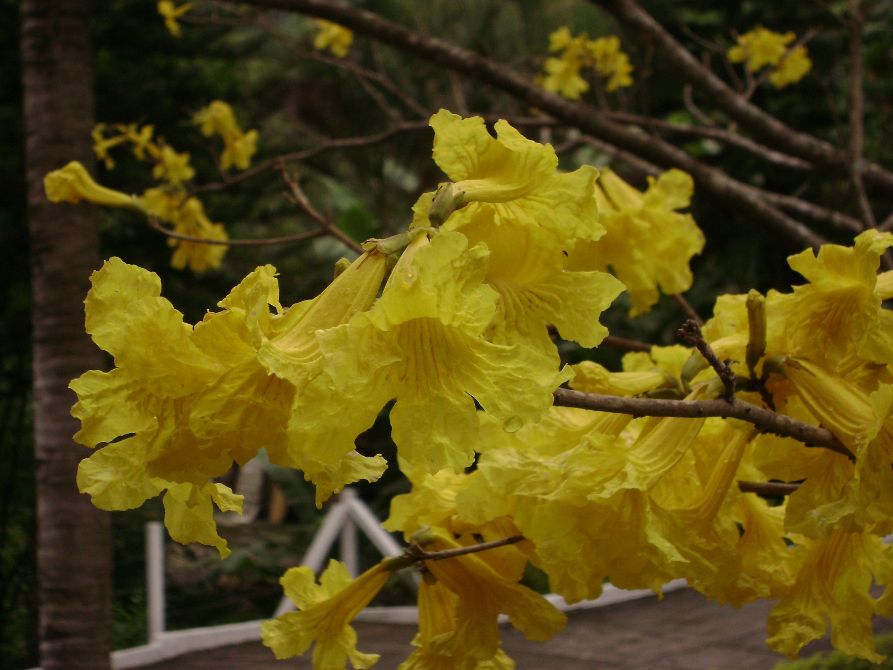 Ipê Amarelo, Blumenau SC, Brazil